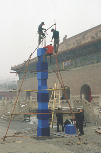 Jürgen Partenheimer, China National Museum of Fine Art, Beijing, "World Axis", Imperial Archives, Forbidden City, Beijing, 2000